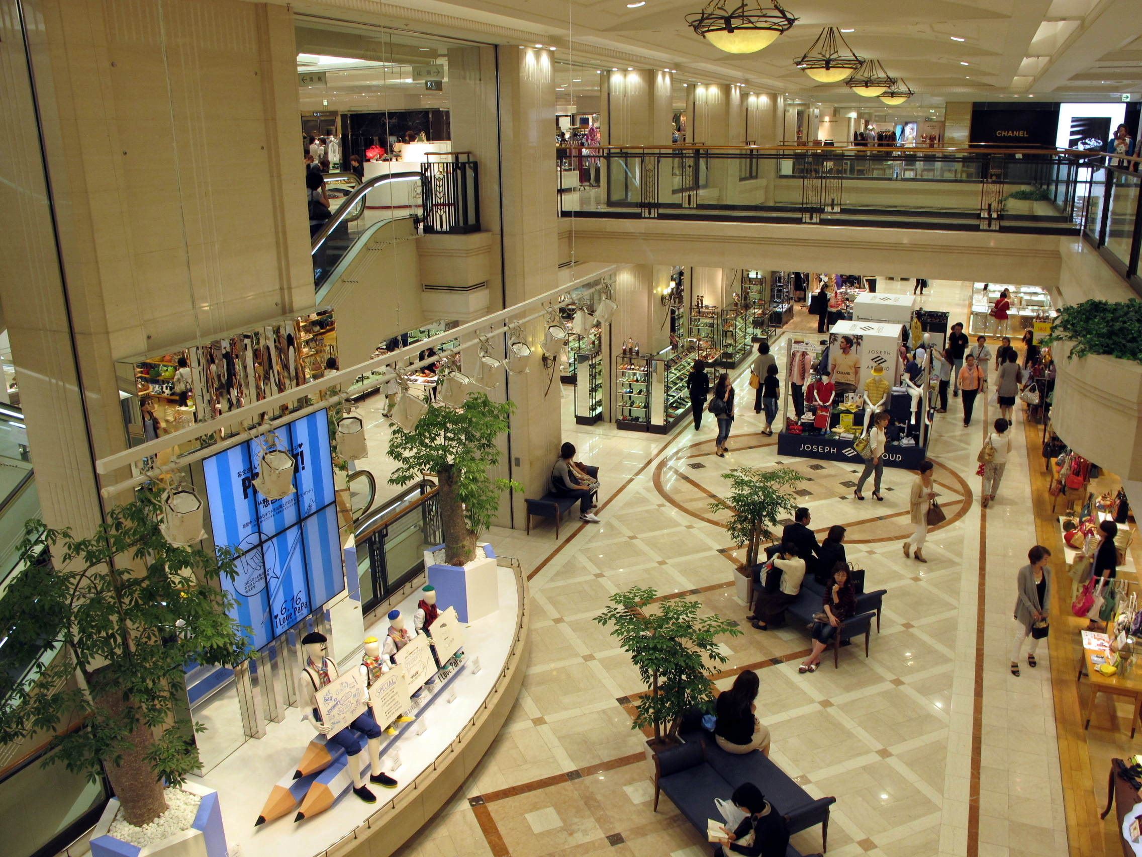 Daimaru Kube Lobby View